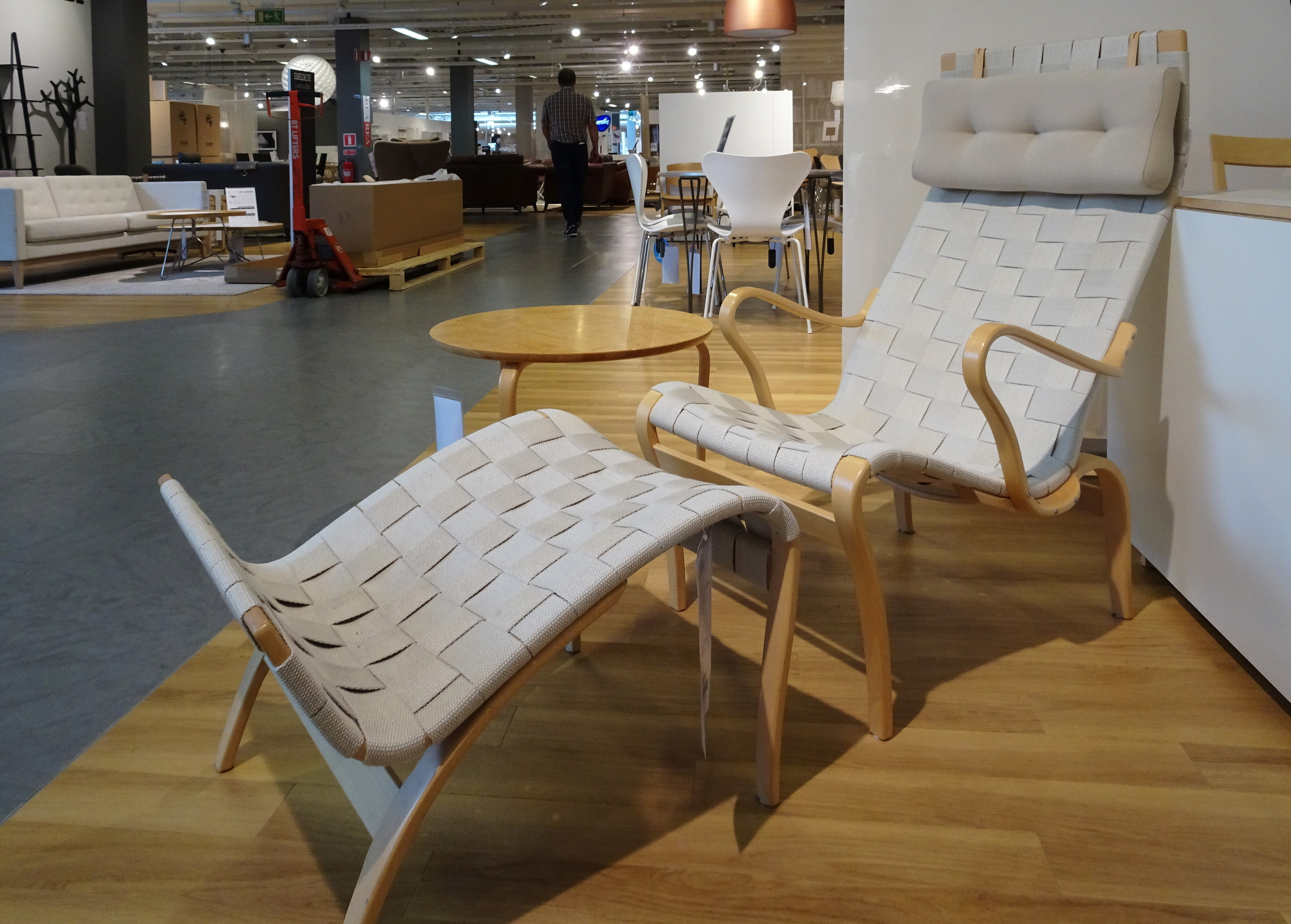 Bruno Mathsson, "Pernilla 2"